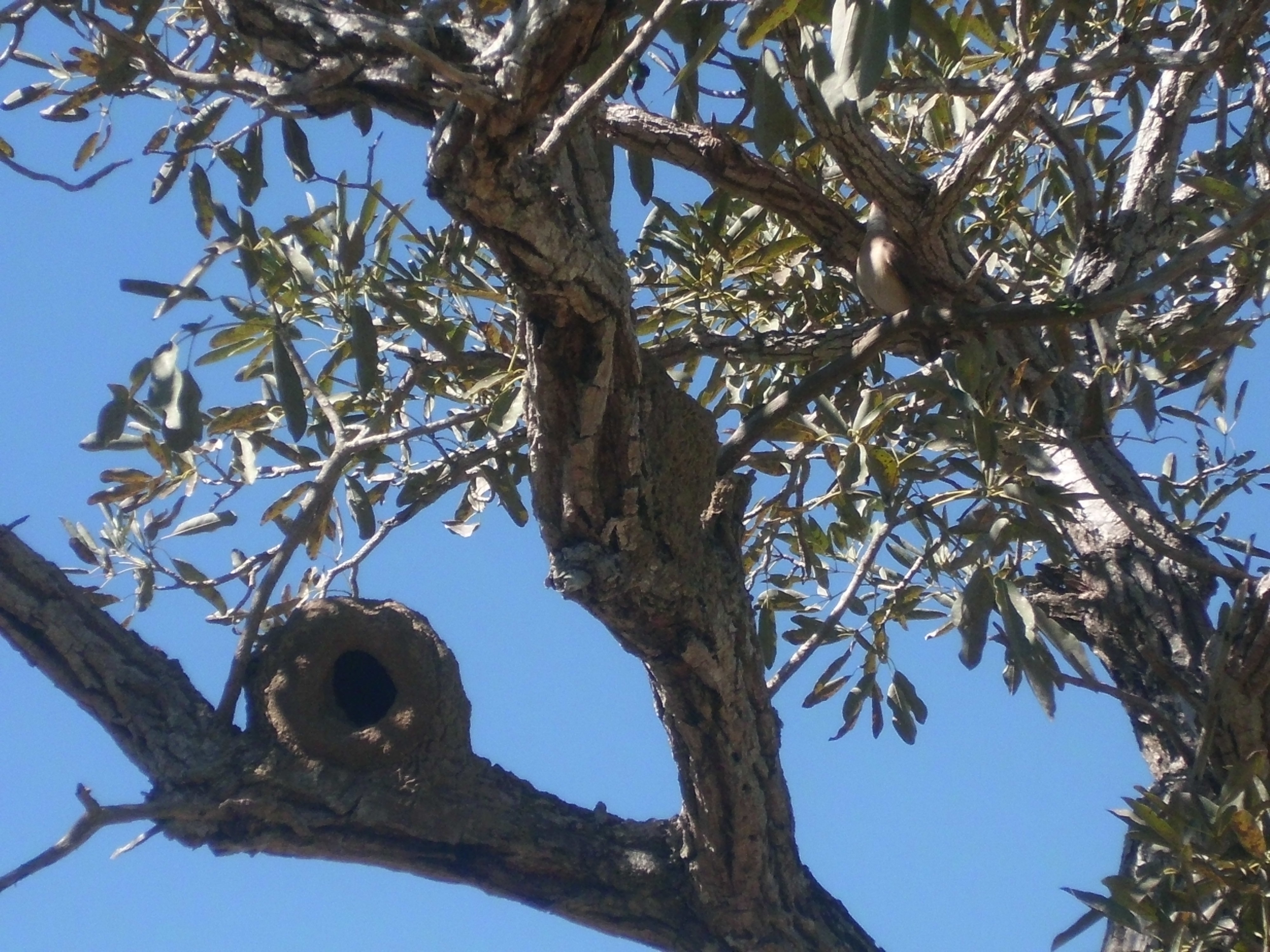 João de Barro